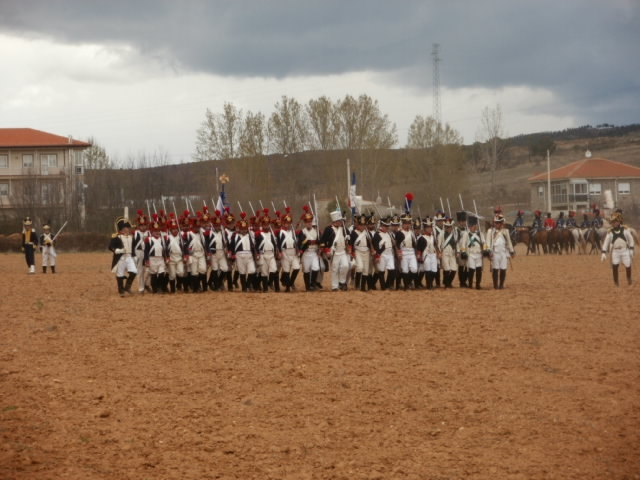 Recreación conmemorativa del bicentenario de la reconquista de Astorga, León.